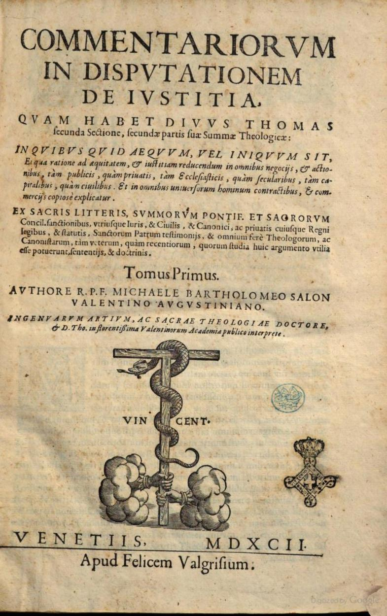 Portada del primer volum de l'obra Commentariorum in disputationem de iustitia de Miquel Bartomeu Salón Ferrer, edició de 1592 de Venècia de 1592. No és la primera edició de l'obra.